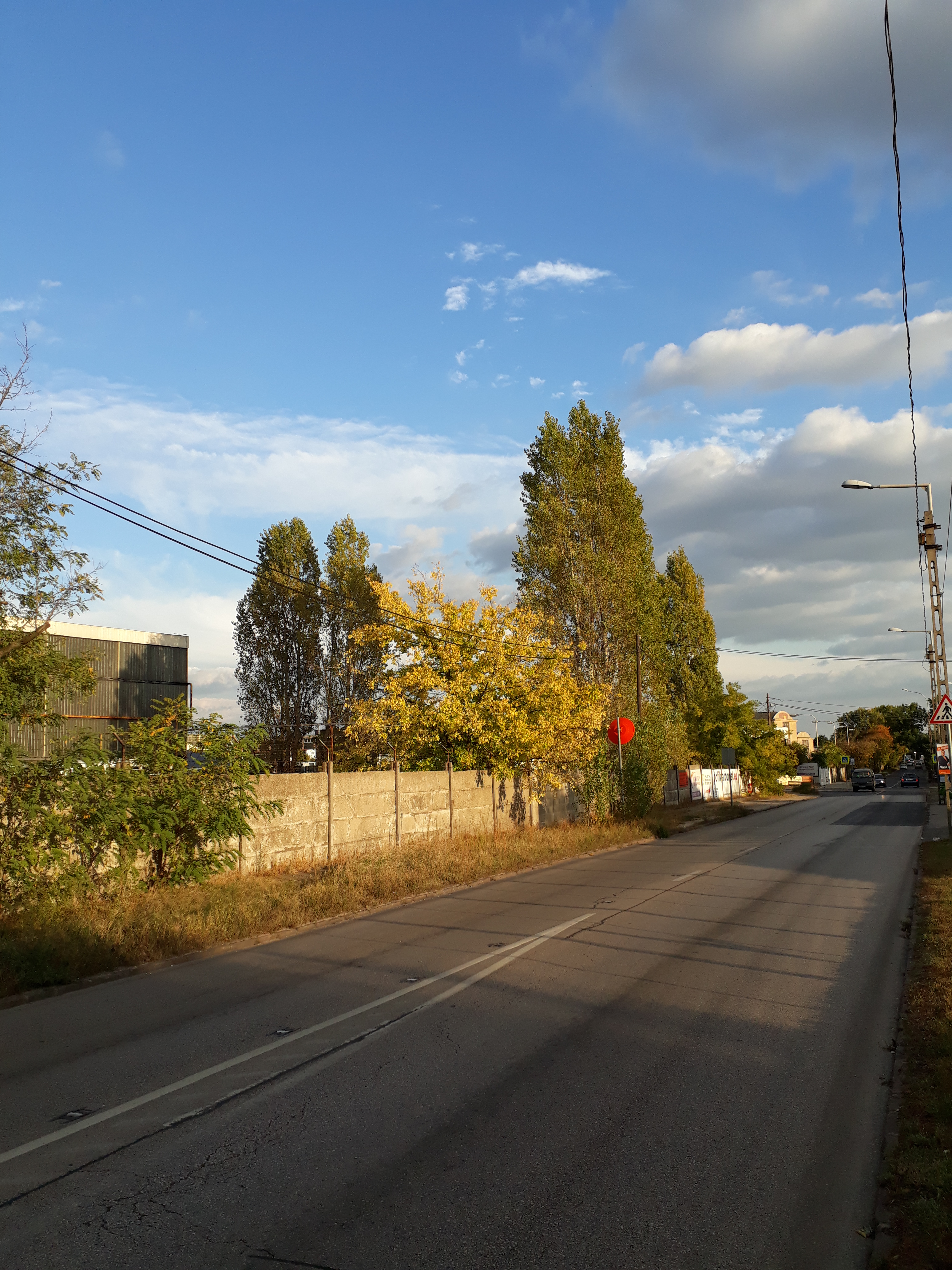 Az Arany János utca és az Ikarus gyár Mátyásföldön